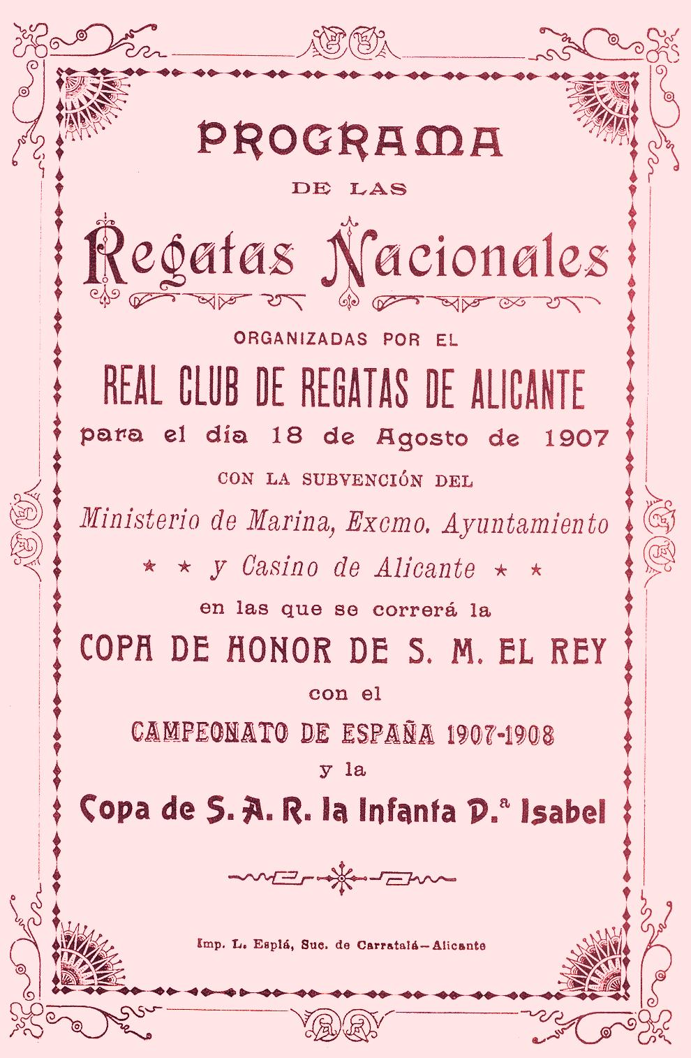 Cartel anunciador de la Copa del Rey comprado en el mercadillo de coleccionistas de Alicante (España)